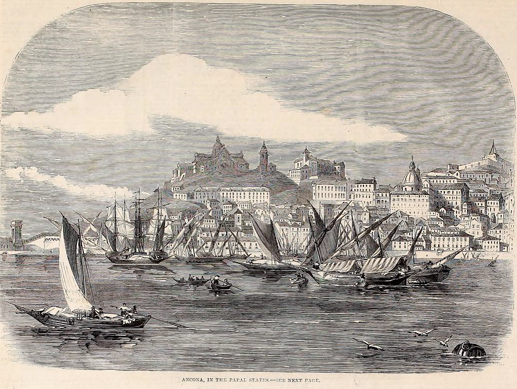 disegno di Ancona e del Duomo nel 1860